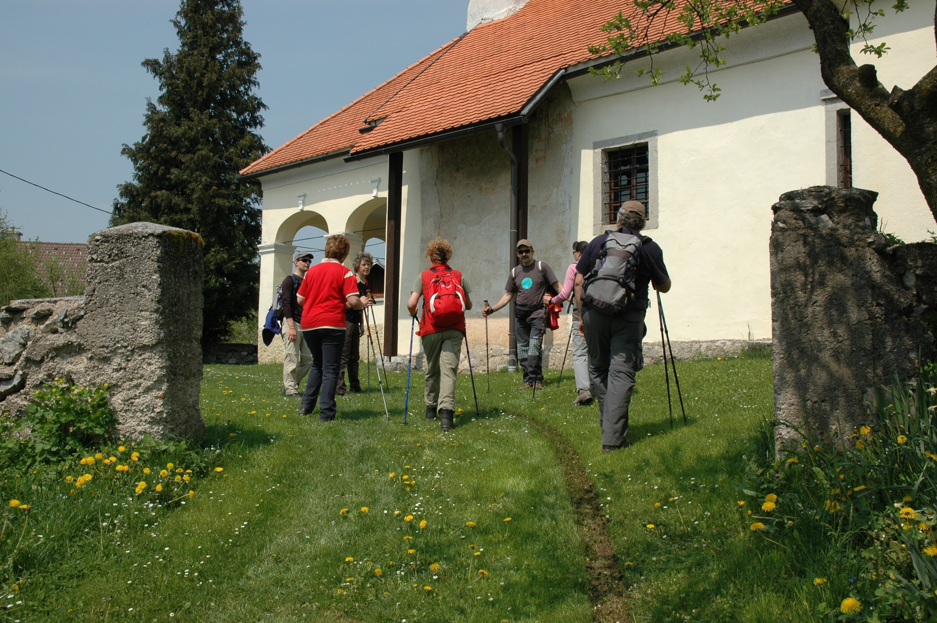 Člani Športnega društva Planjava Babno Polje